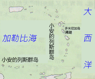 中文（中国大陆）: 沸湖嘅地理位置，自己嘅原創圖片